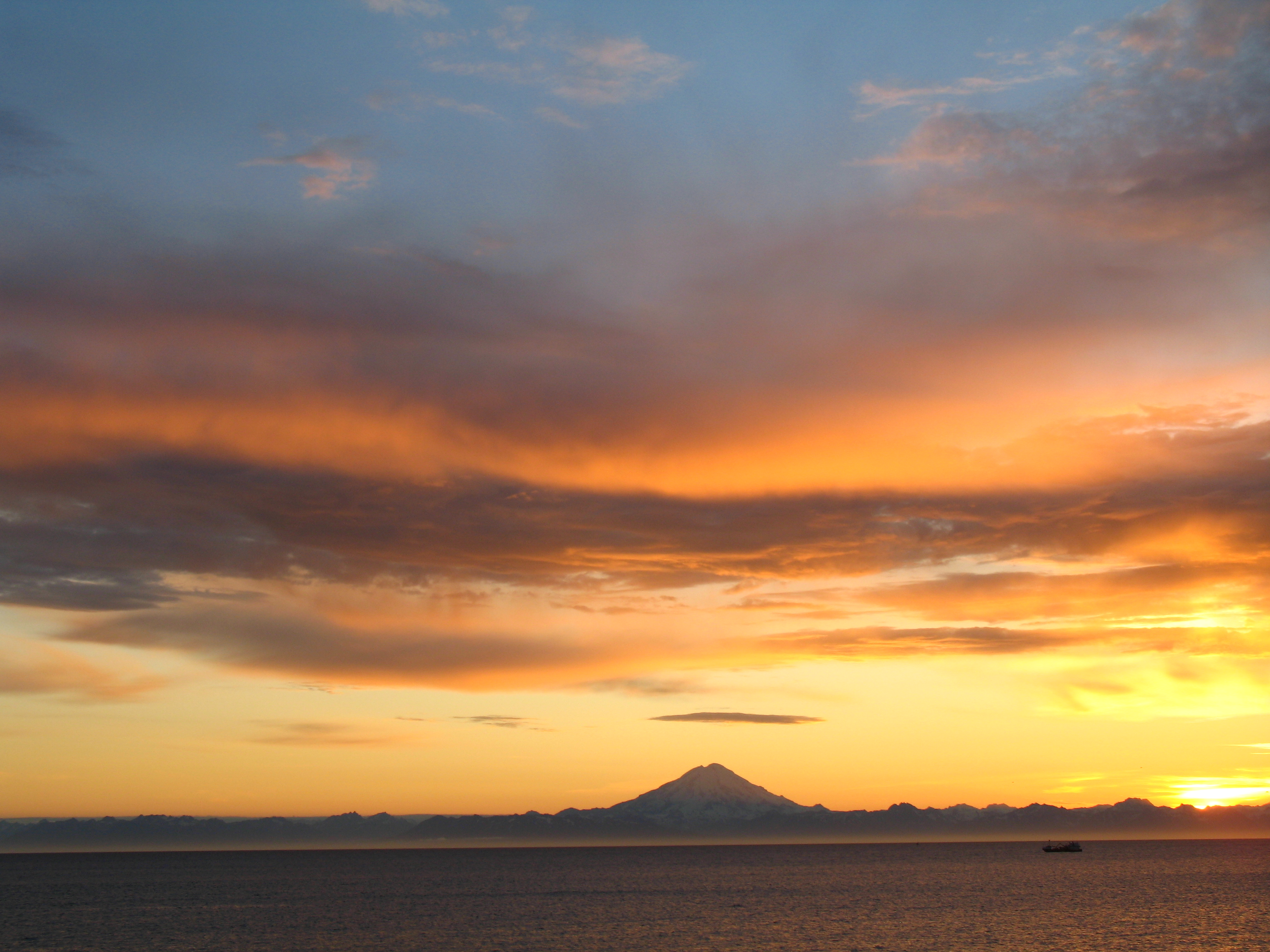 Alaska, Cook Inlet from Ninilchik